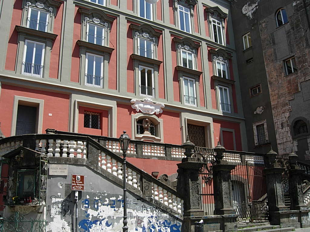 Complesso di Sant'Antonio delle Monache a Port'Alba in Napoli Foto personale concessa in PD